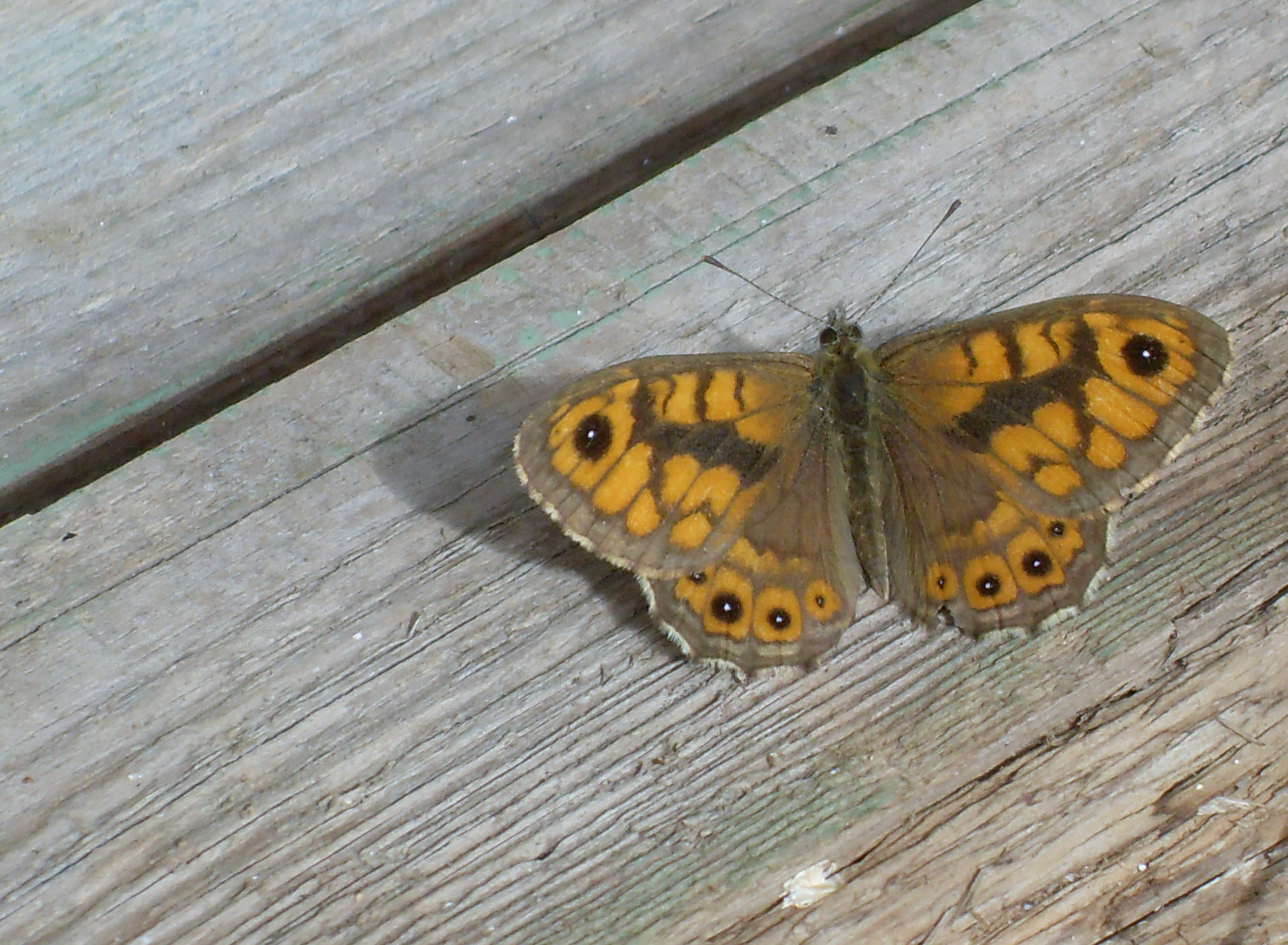 Der Mauerfuchs ist einer von vielen Schmetterlingsarten, die im Heckengäu heimisch sind.